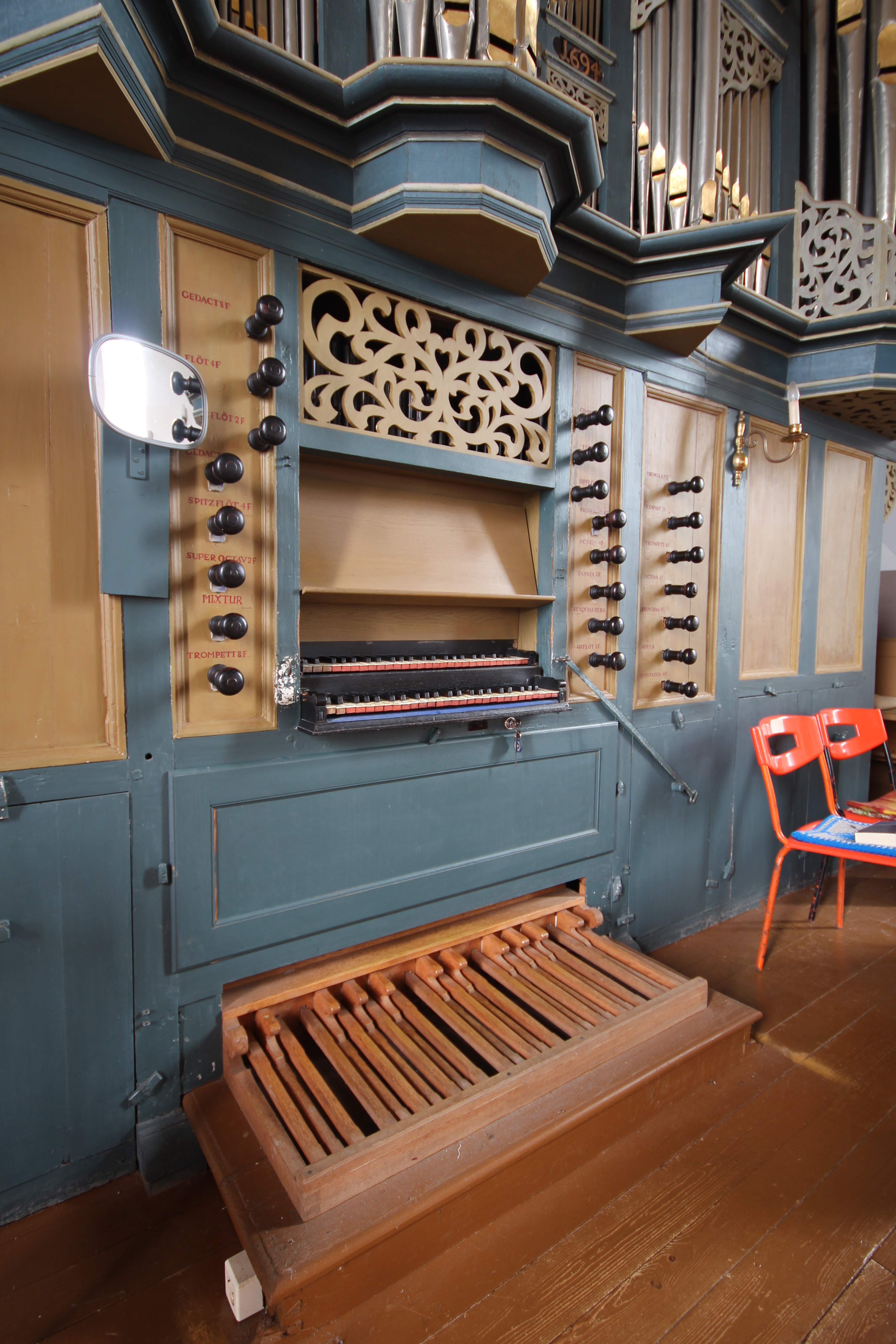 Spieltisch der Kayser-Orgel der Kirche St. Sixtus und Sinicius zu Wangerland-Hohenkirchen